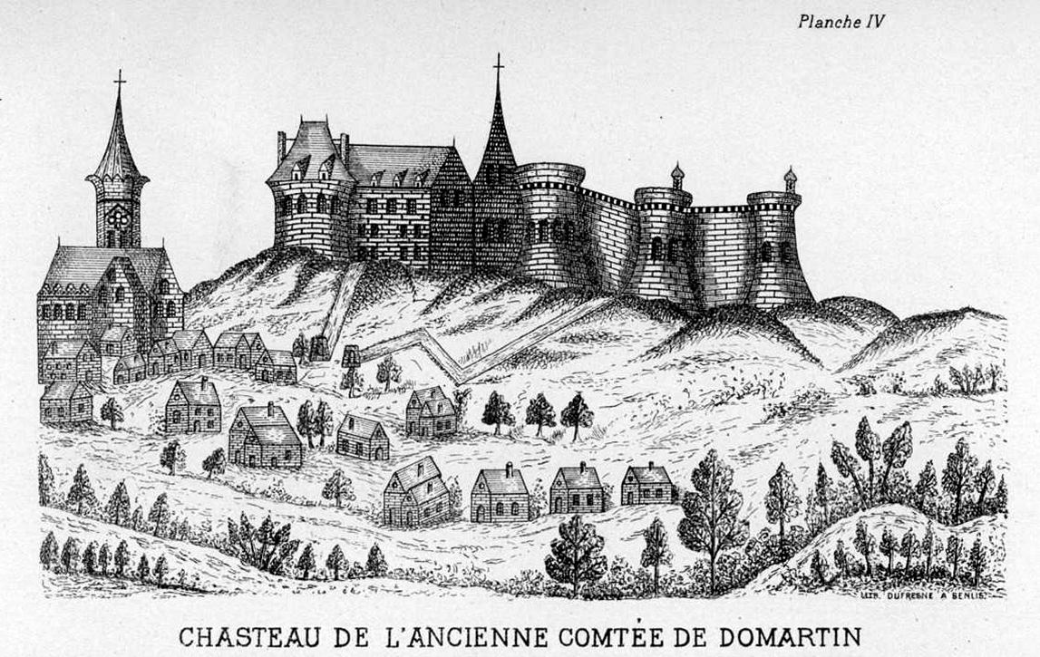 « Chasteau de l'ancienne Comtée de Domartin » au XVIe siècle, d'après une ancienne estampe.